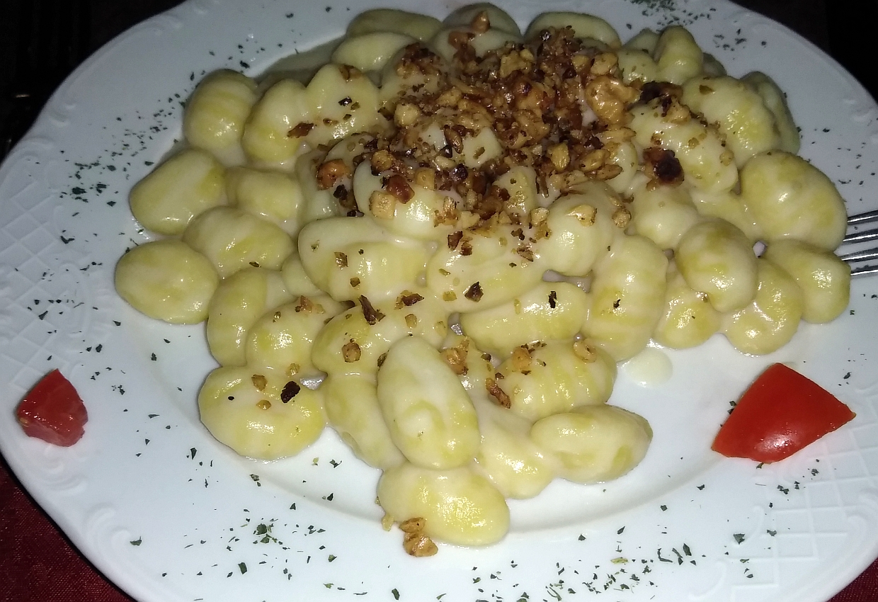 Un piatto di gnocchi di patate al Castelmagno con granella di noci tostate (ricetta piemontese)